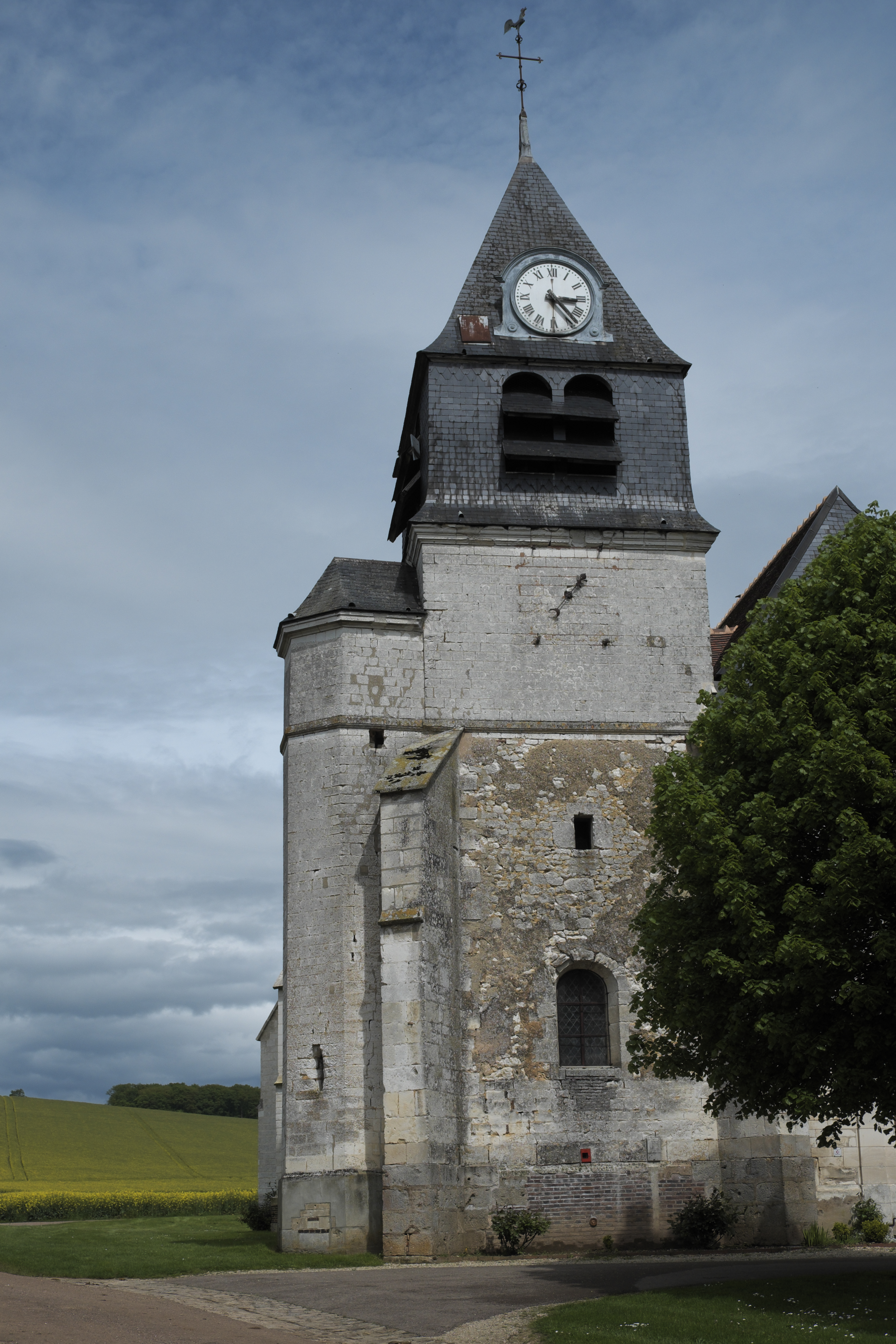 Katholische Pfarrkirche Saint-Sébastien et Sainte-Croix in Villemoiron-en-Othe im Département Aube (Champagne-Ardenne/Frankreich), Kirchturm